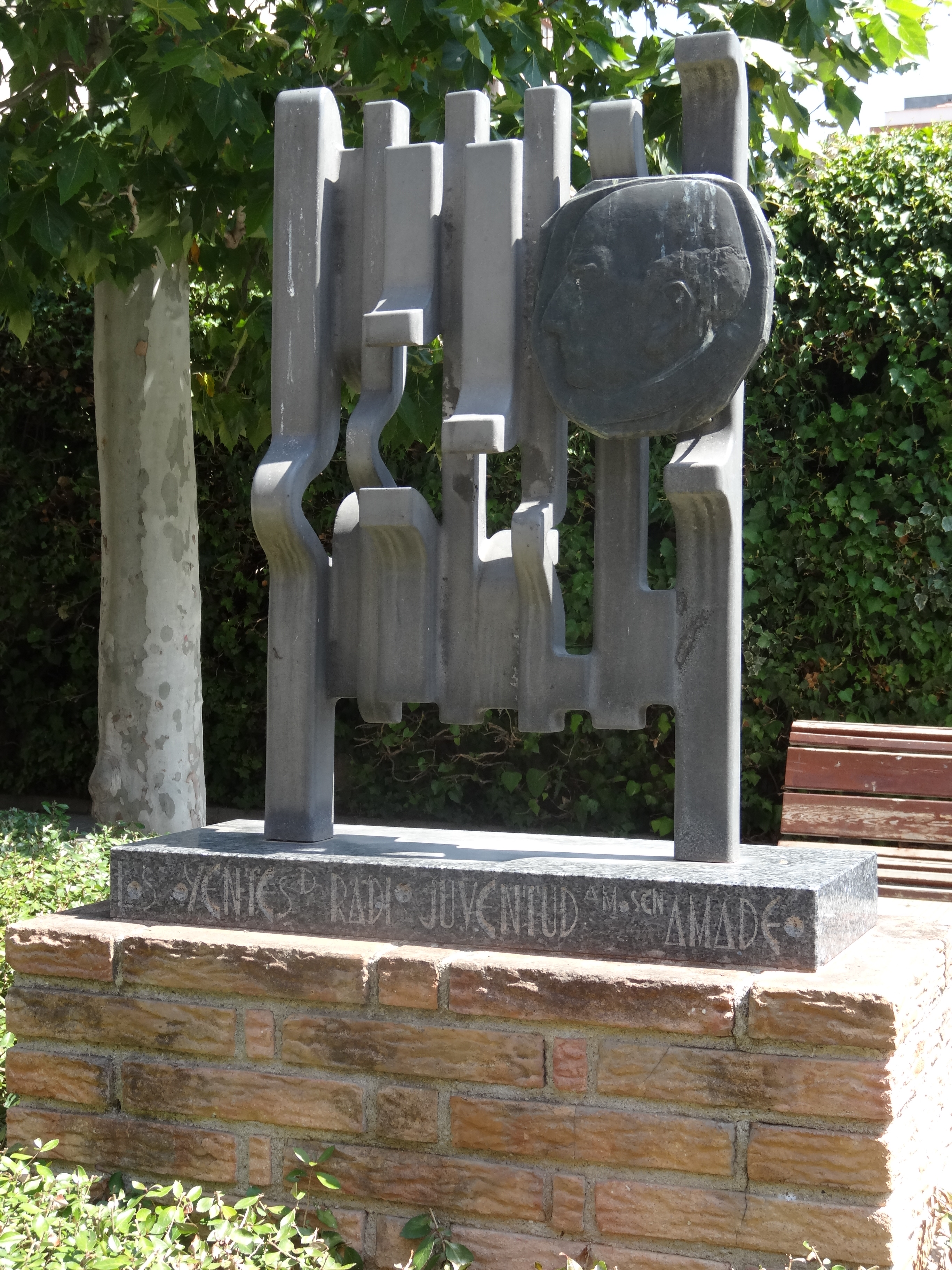 Monument amb la inscripció "Los Oyentes de Radio Juventud a Mosen Amadeo", referida a Mossen Amadeu Amenós i Roca. Carrer Cardenal Vives, 12, Igualada.